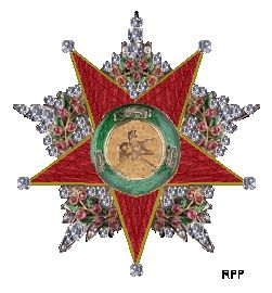 Ster van deze orde